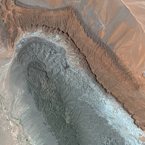 Talampaya National Park by SPOT Satellite